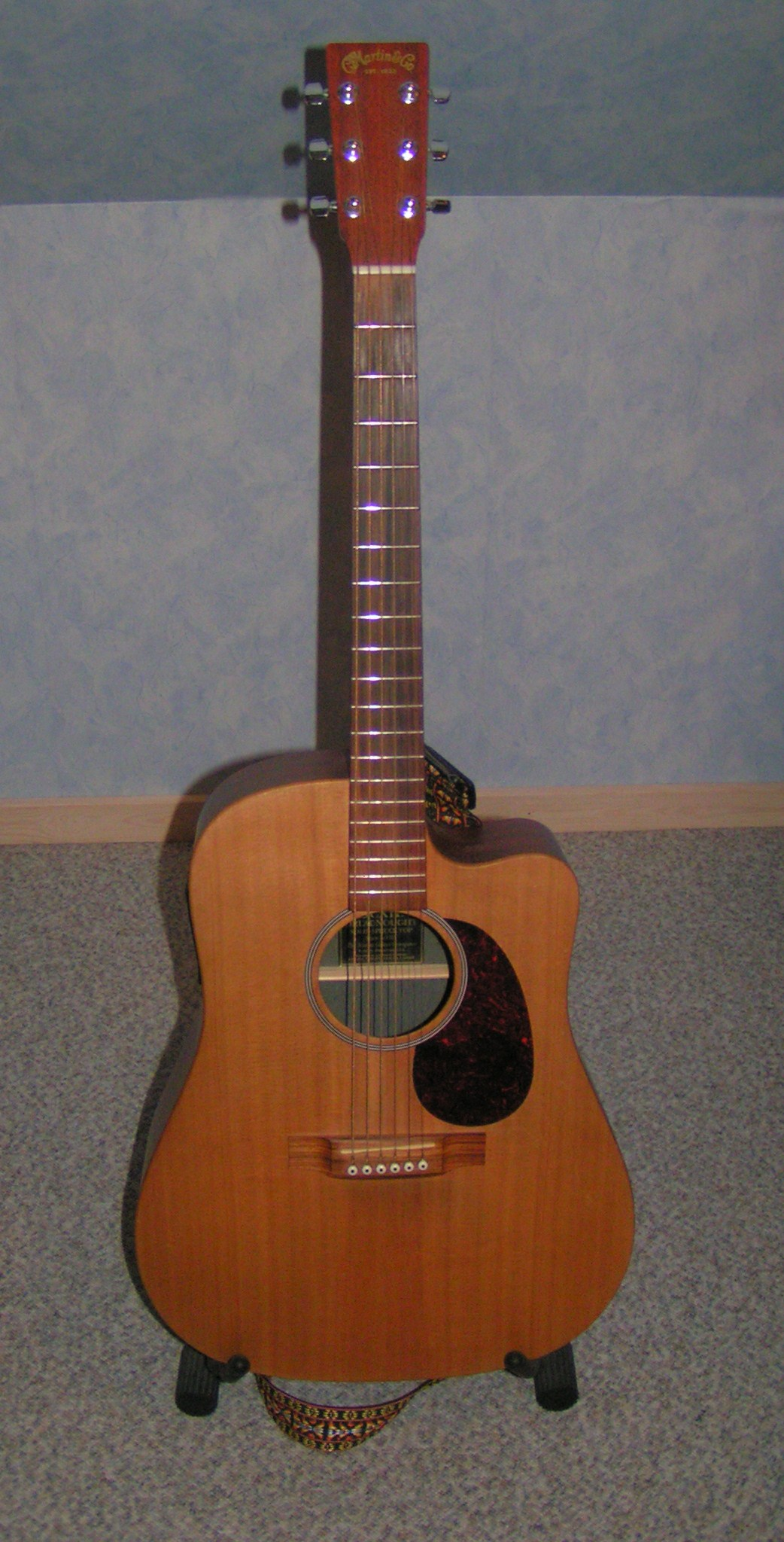 Western guitar - Martin og Co.jpg.